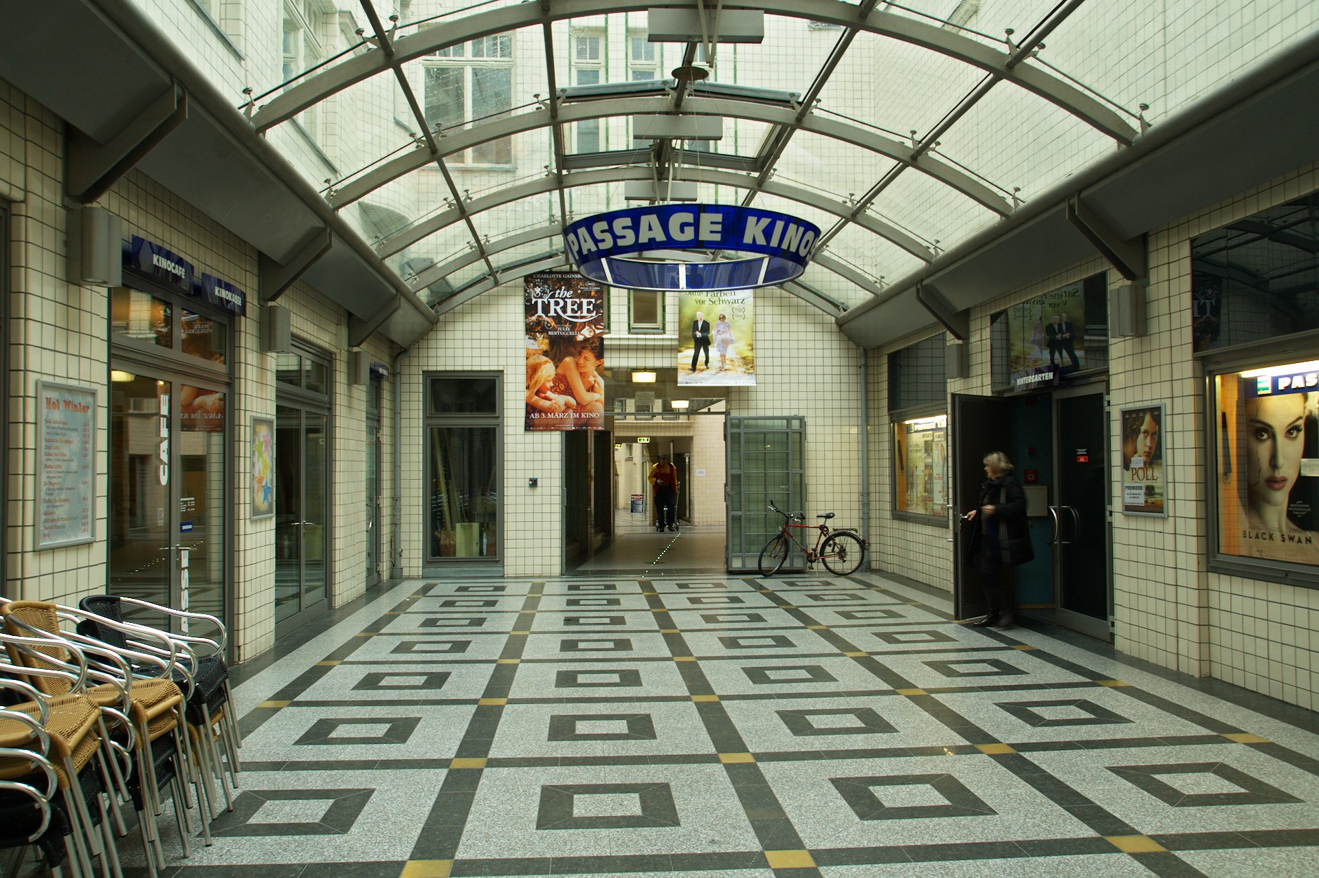 Passage Kino im Jägerhof